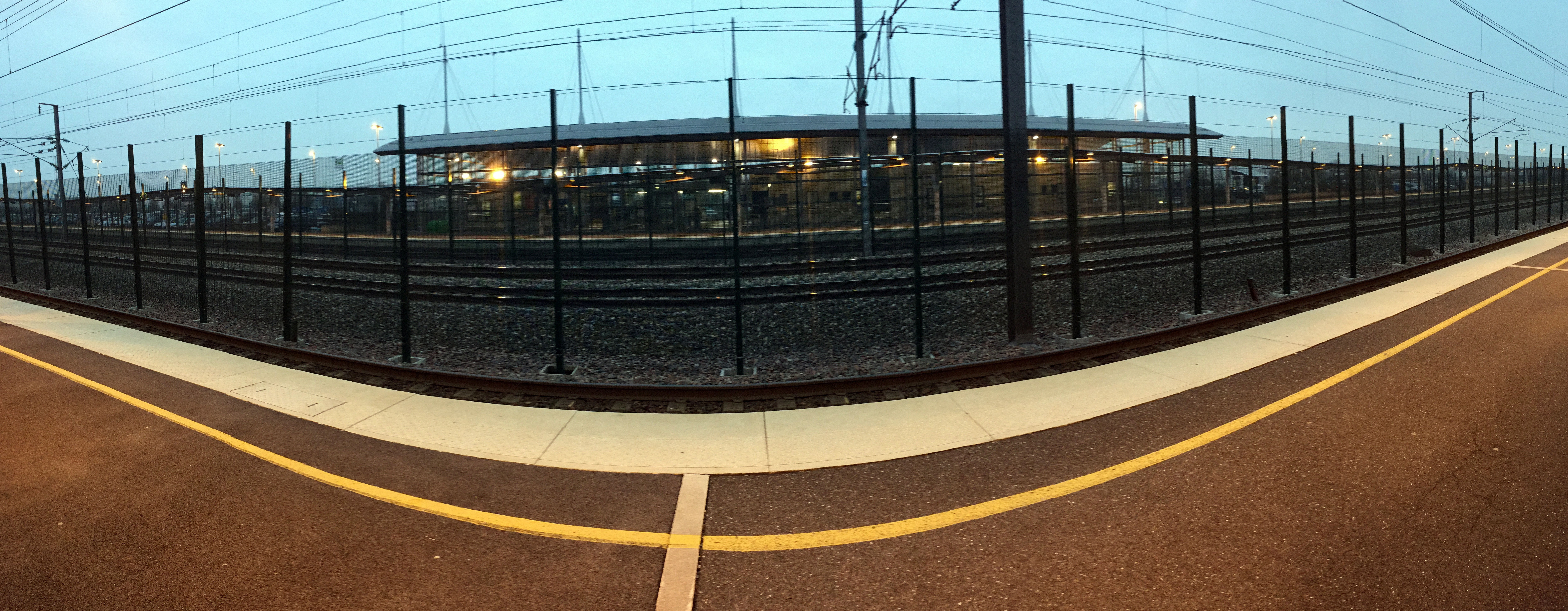 Gare de TGV Haute-Picardie depuis le quai de la voie 4.